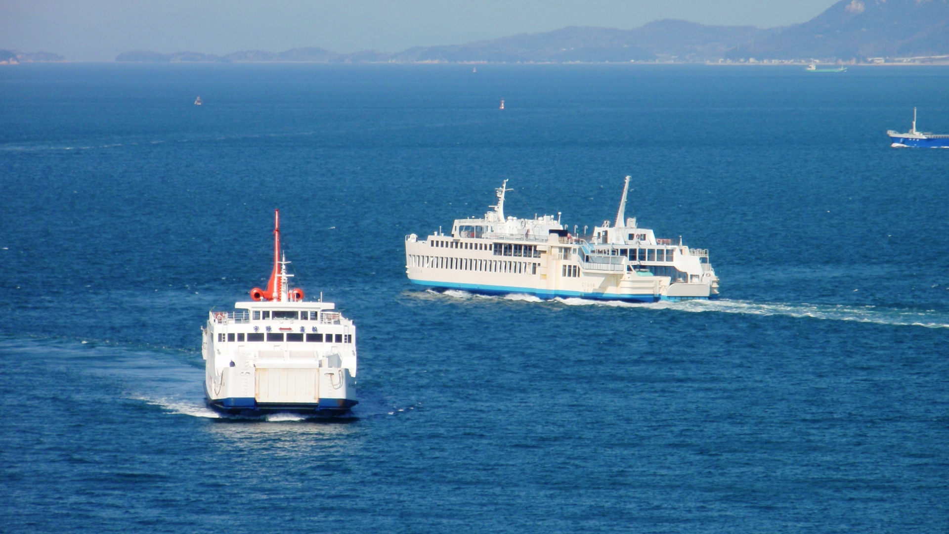 香川県高松市と岡山県玉野市を結ぶ宇高航路を航行するフェリー。左が四国フェリー（第八十七玉高丸）で右が宇高国道フェリー（こくどう丸）。高松港沖にて。